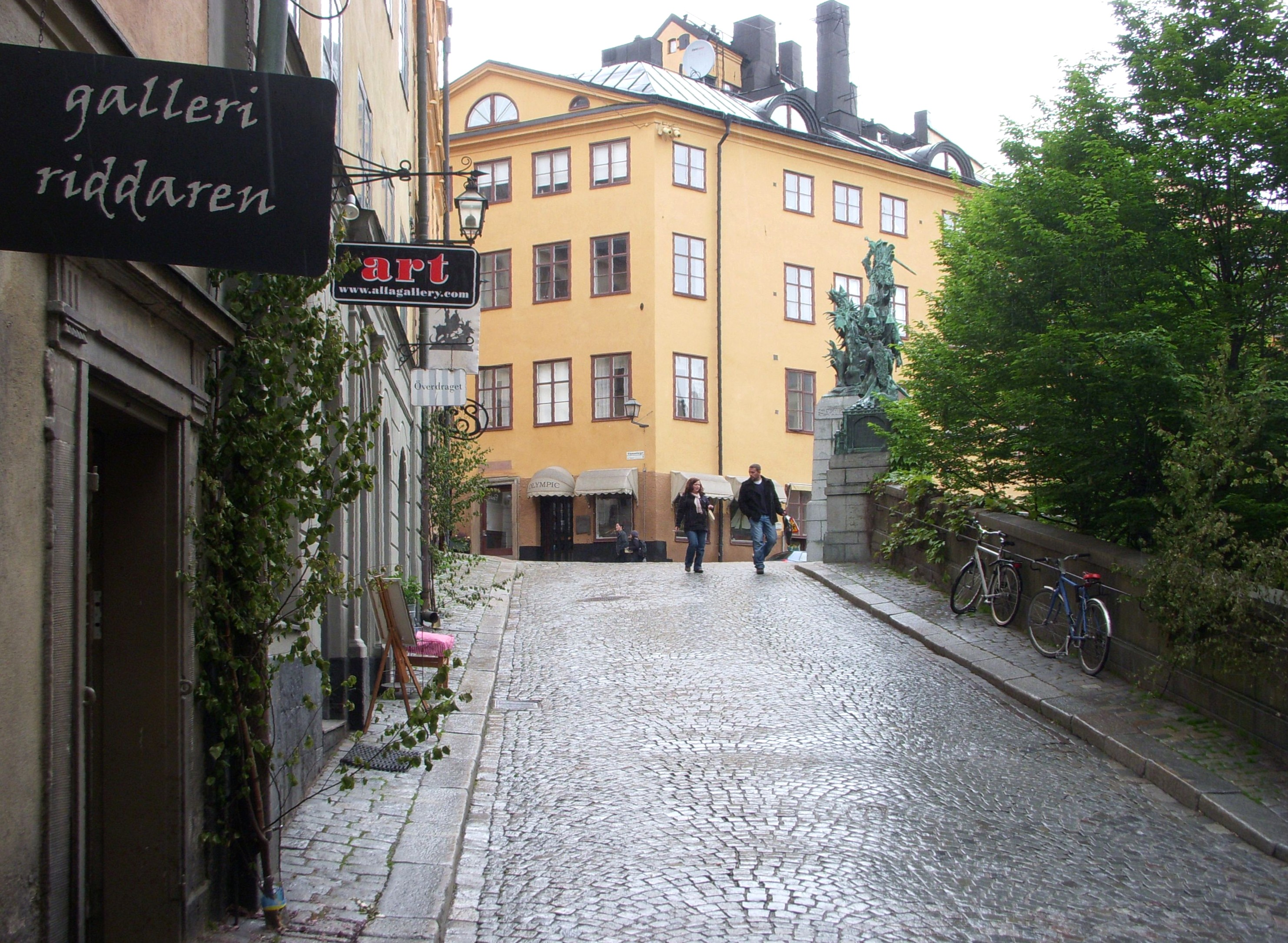 Köpmanbrinken (södra) i Gamla stan, vy från Österlånggatan mot norr